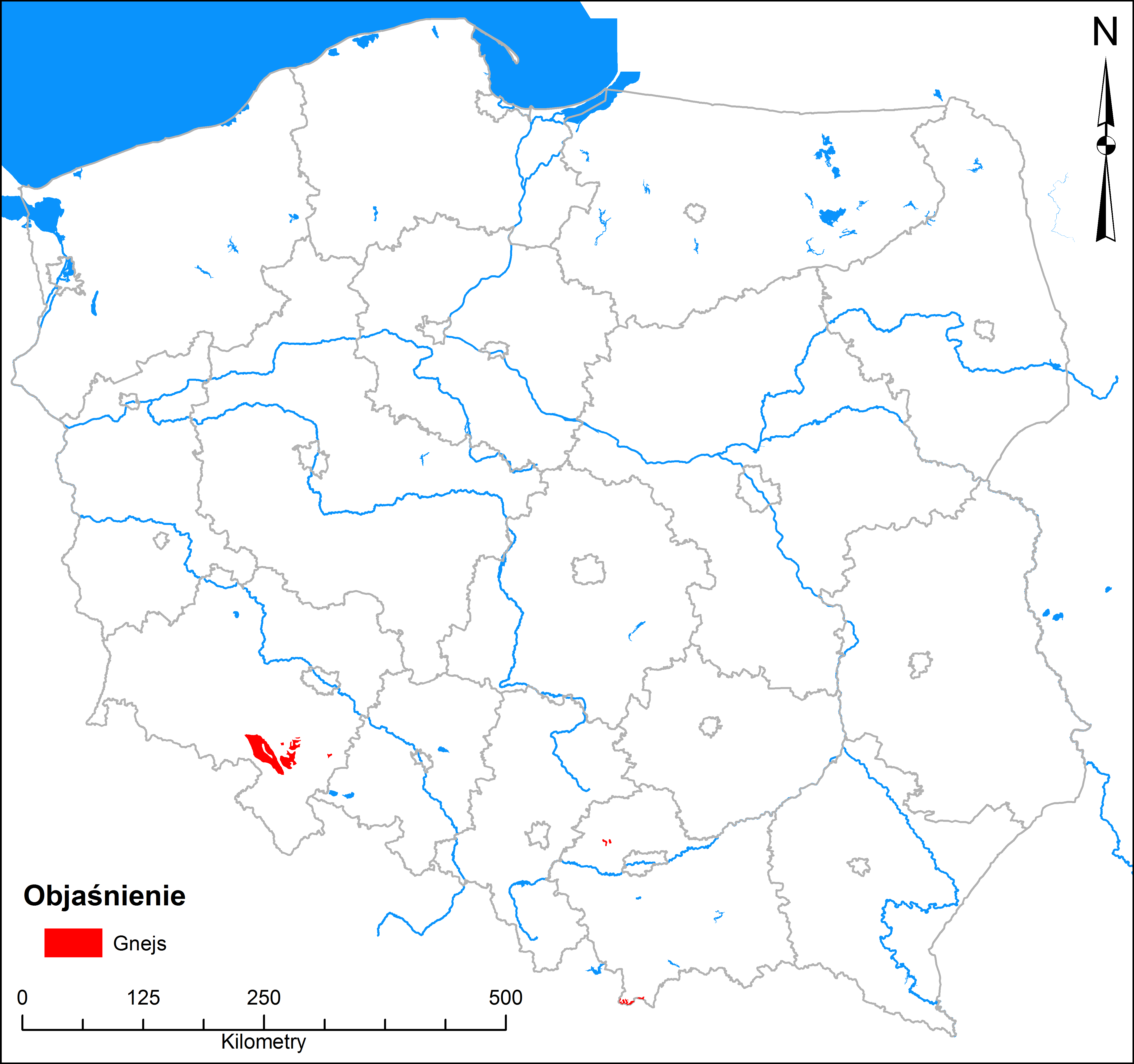 Złoża gnejsu w Polsce